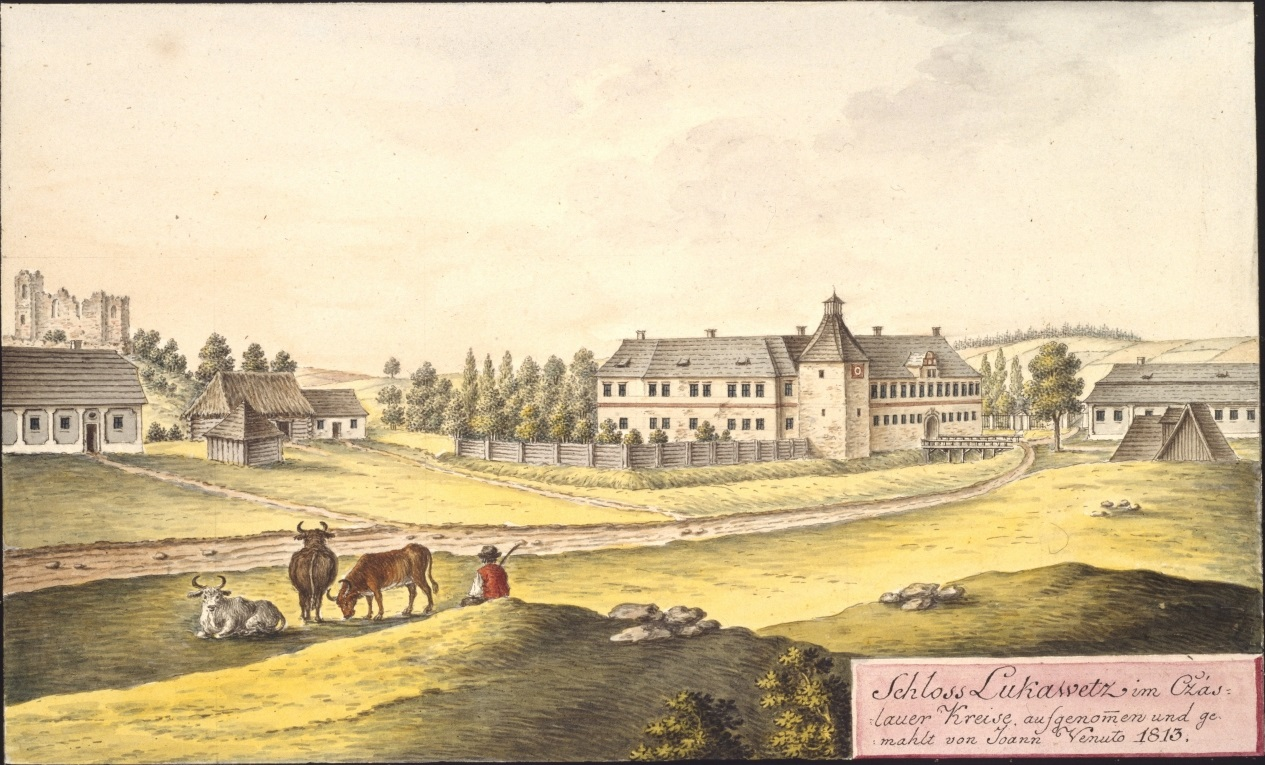 Zámek Lukavec. Schloss Lukawetz im Cžaslauer Kreise, aufgenommen und gemahlt von Joann Venuto 1813